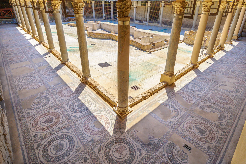 Piazza Armerina, Sicily